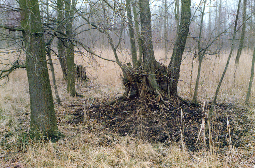 „Erlenstelze“ – Schwarz-Erle (Alnus glutinosa) nach Grundwasserabsenkung auf stelzähnlichen Wurzeln im Großen Giebelmoor innerhalb des Giebelmoors, Landkreis Gifhorn, Niedersachsen